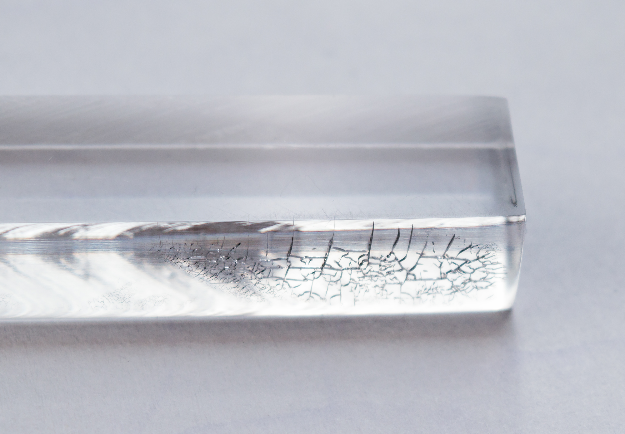 Zahlreiche Spannungsrisse von unterschiedlicher Größe durchziehen die Oberfläche dieses Stücks PMMA.